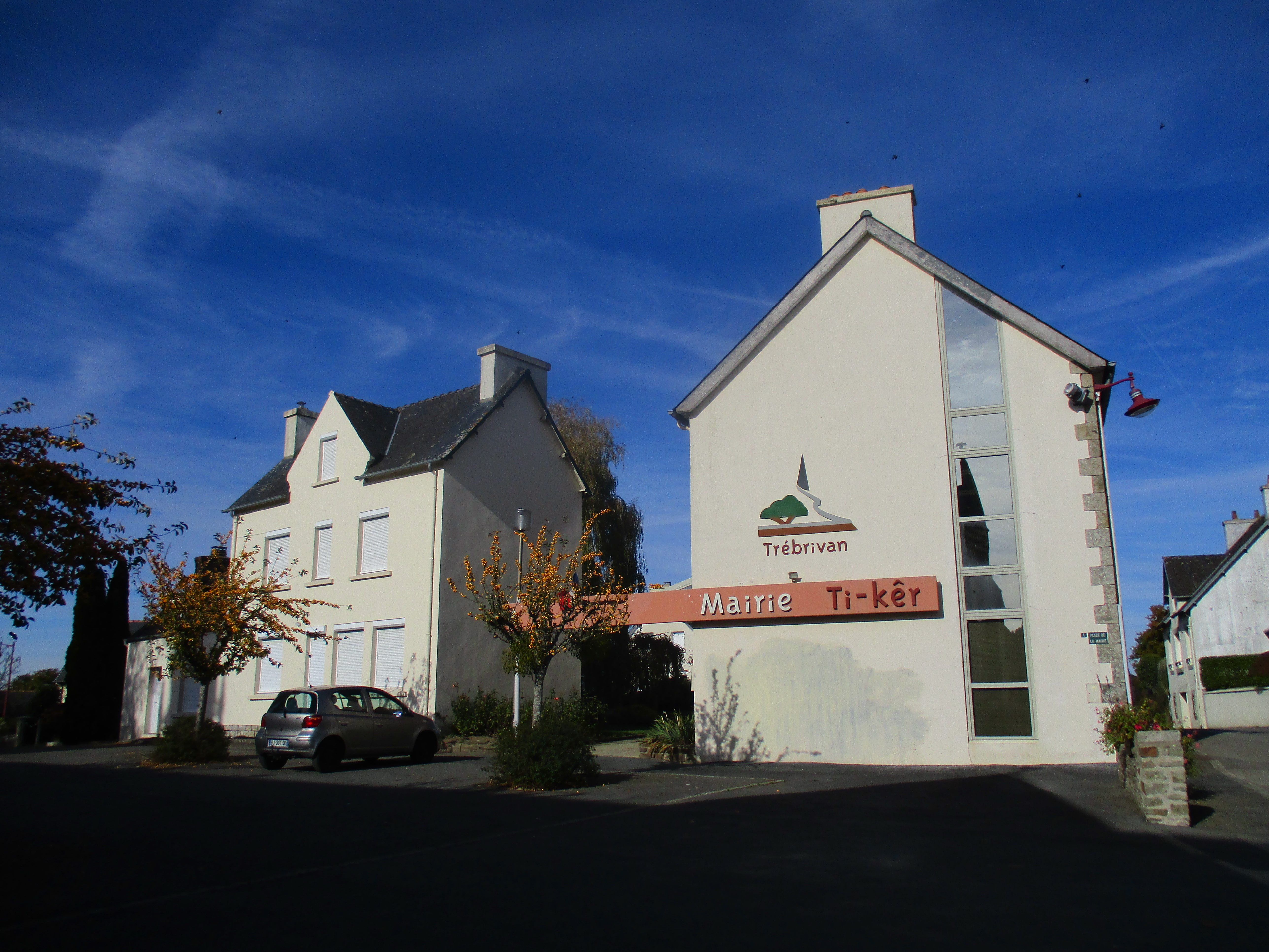 La mairie de Trébrivan